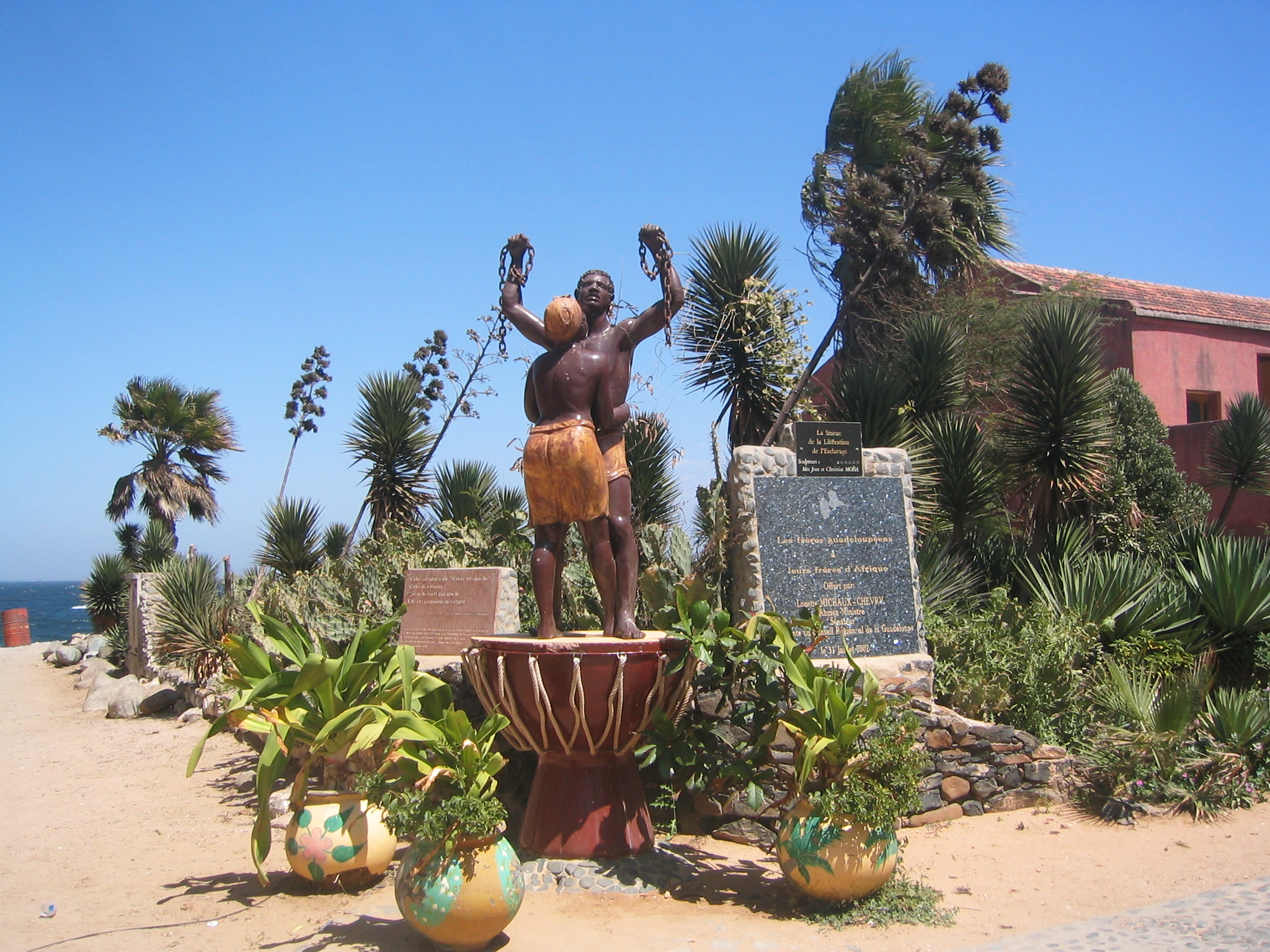 Ile de Gorée (Sénégal) - Monument en mémoire de l'esclavage, situé à proximité de la Maison des esclave